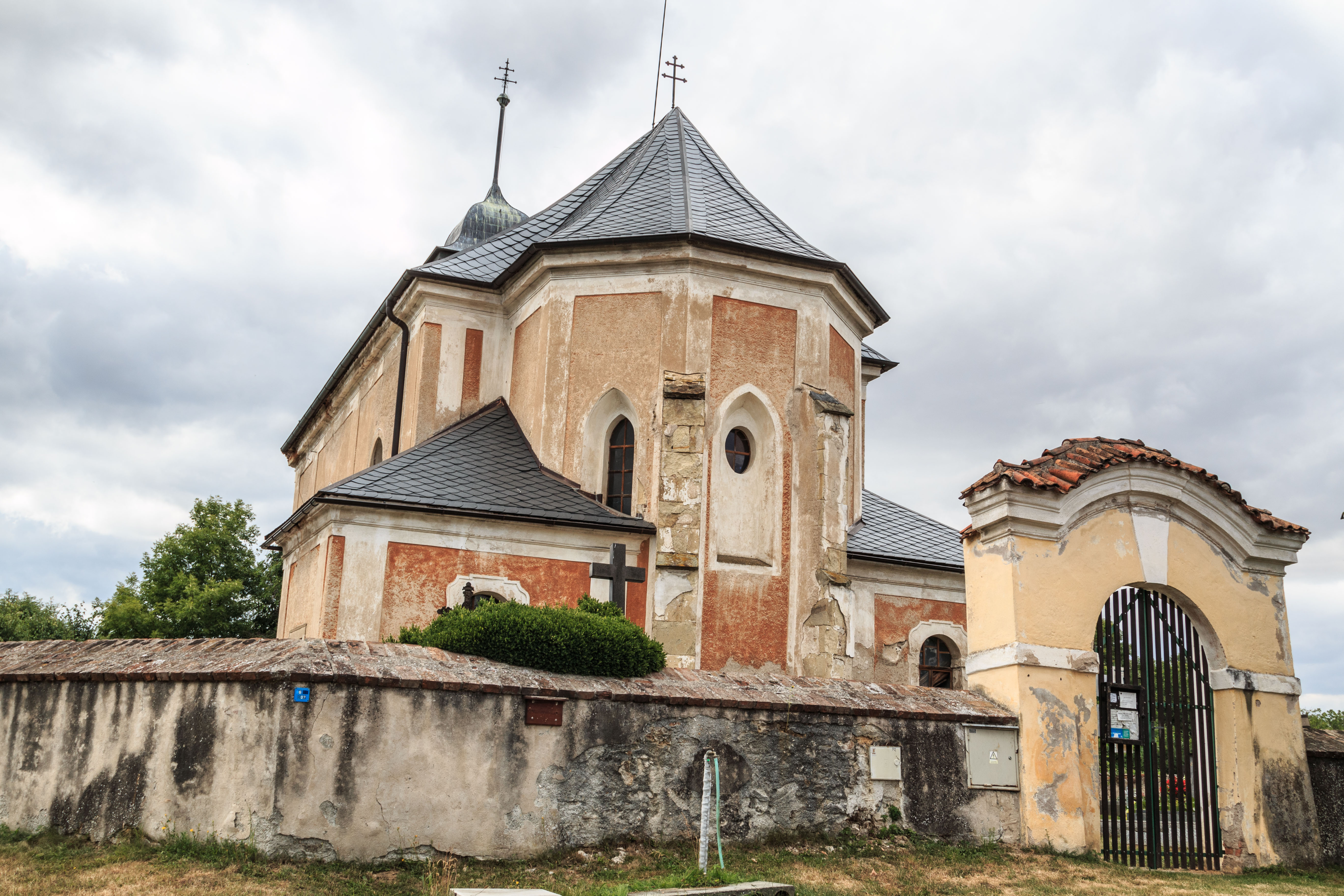 Kostel svatého Bartoloměje, Heřmanice (okres Havlíčkův Brod).